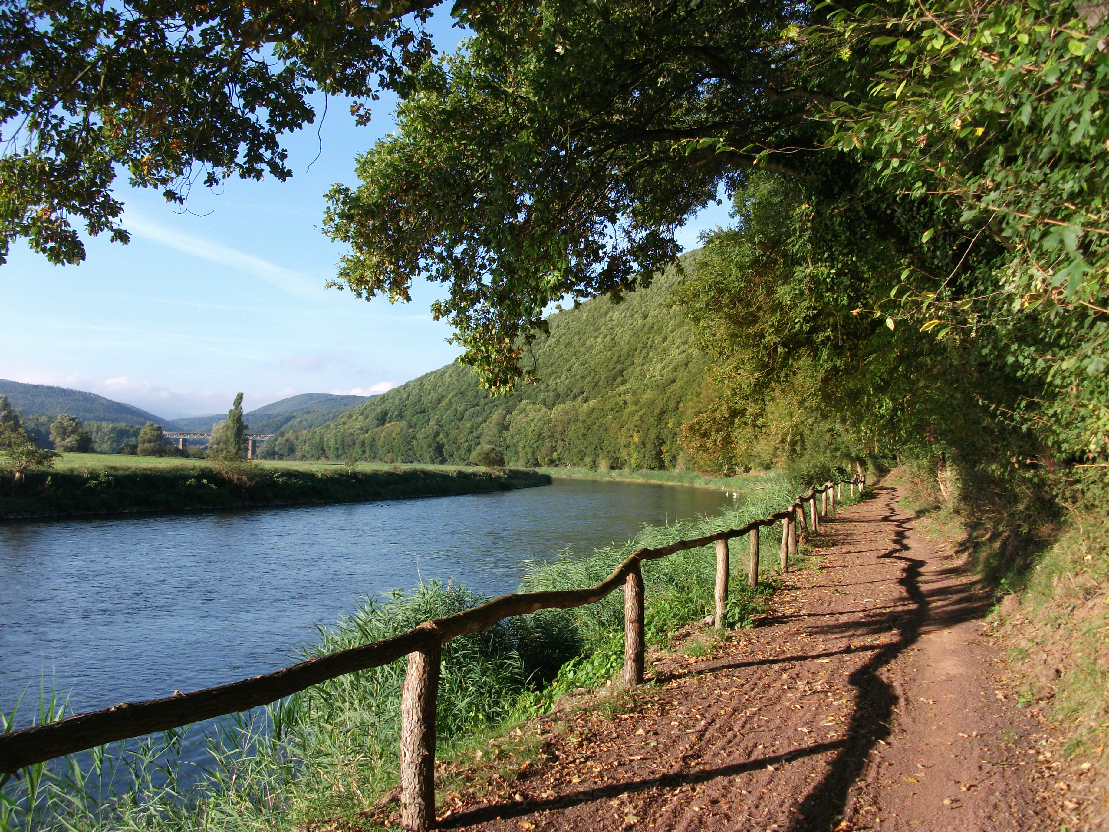 Naturschutzgebiet Harthberg (rechts), WDPA ID 163534. Radweg am Harthberg zwischen Lindewerra und Werleshausen. Im Hintergrund die Werrabrücke bei Oberrieden und dahinterliegende Teile des Soodener Berglandes